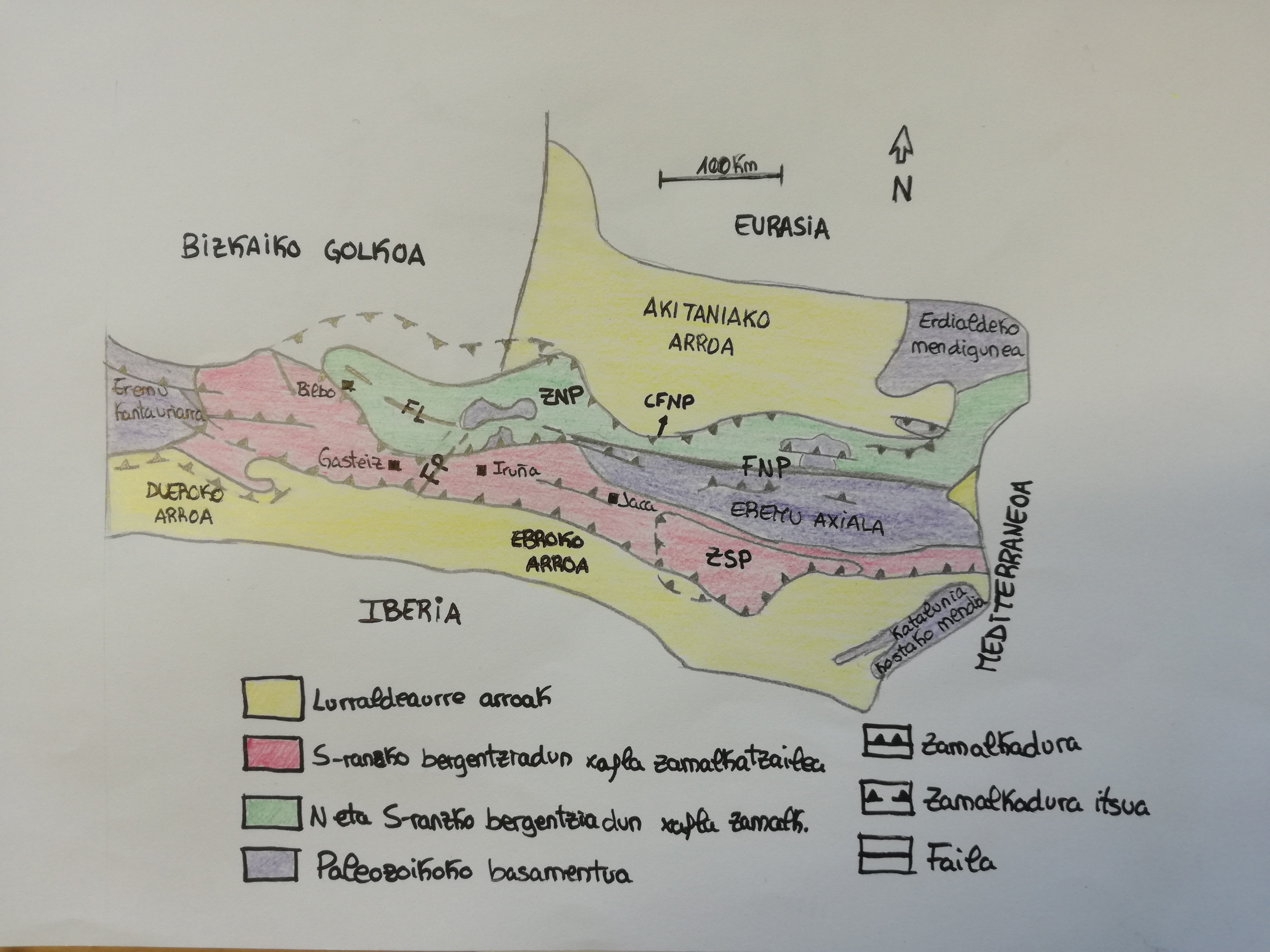 Eusko-kantauriar arroko kokapena Pirinioetan.